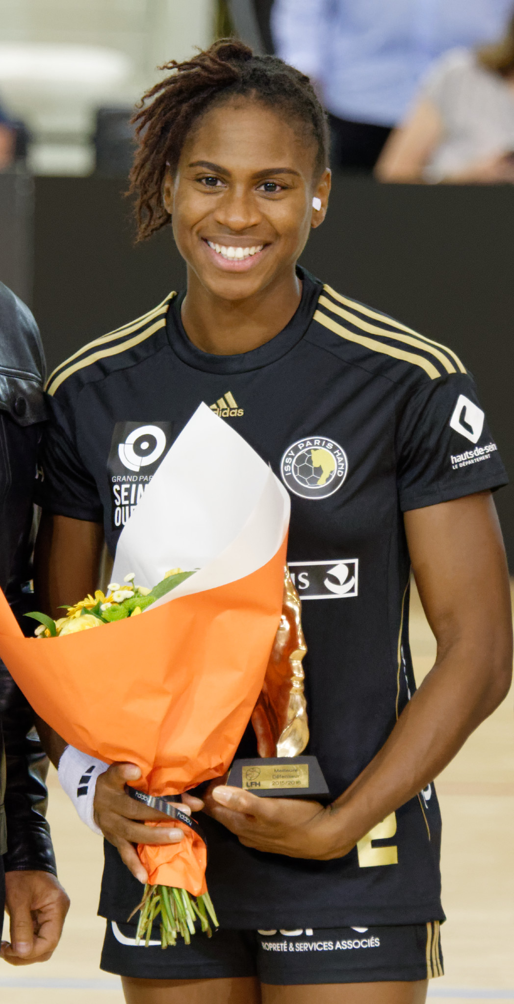 Coralie Lassource reçoit son trophée de meilleure défenseuse de la saison de LFH 2015-16.